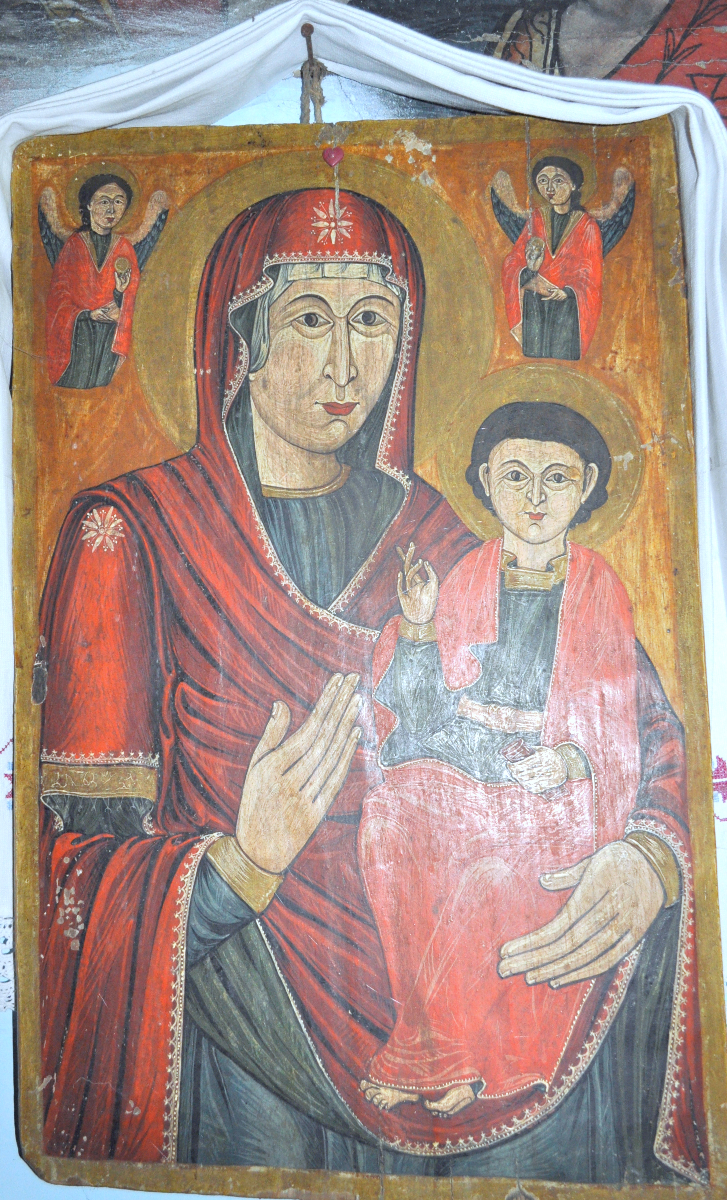 Biserica de lemn “Învierea Domnului” din Cubleșu, județul Sălaj